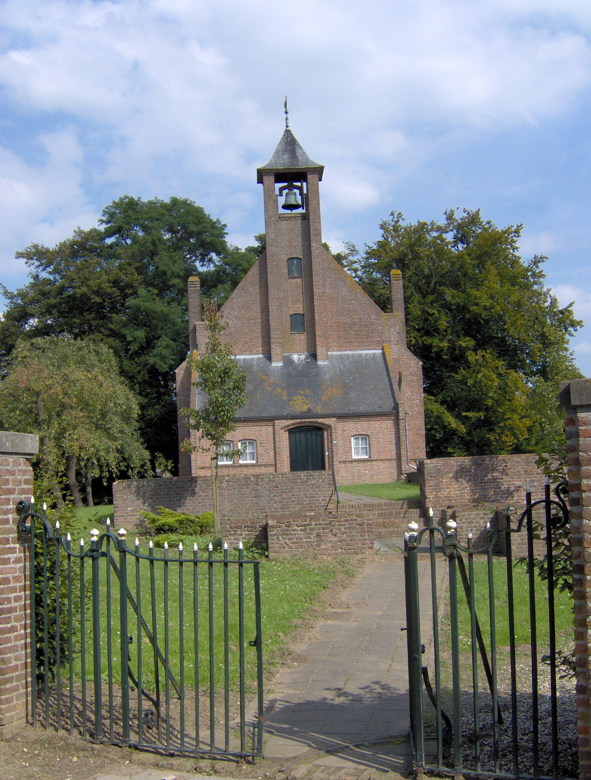 eigen foto